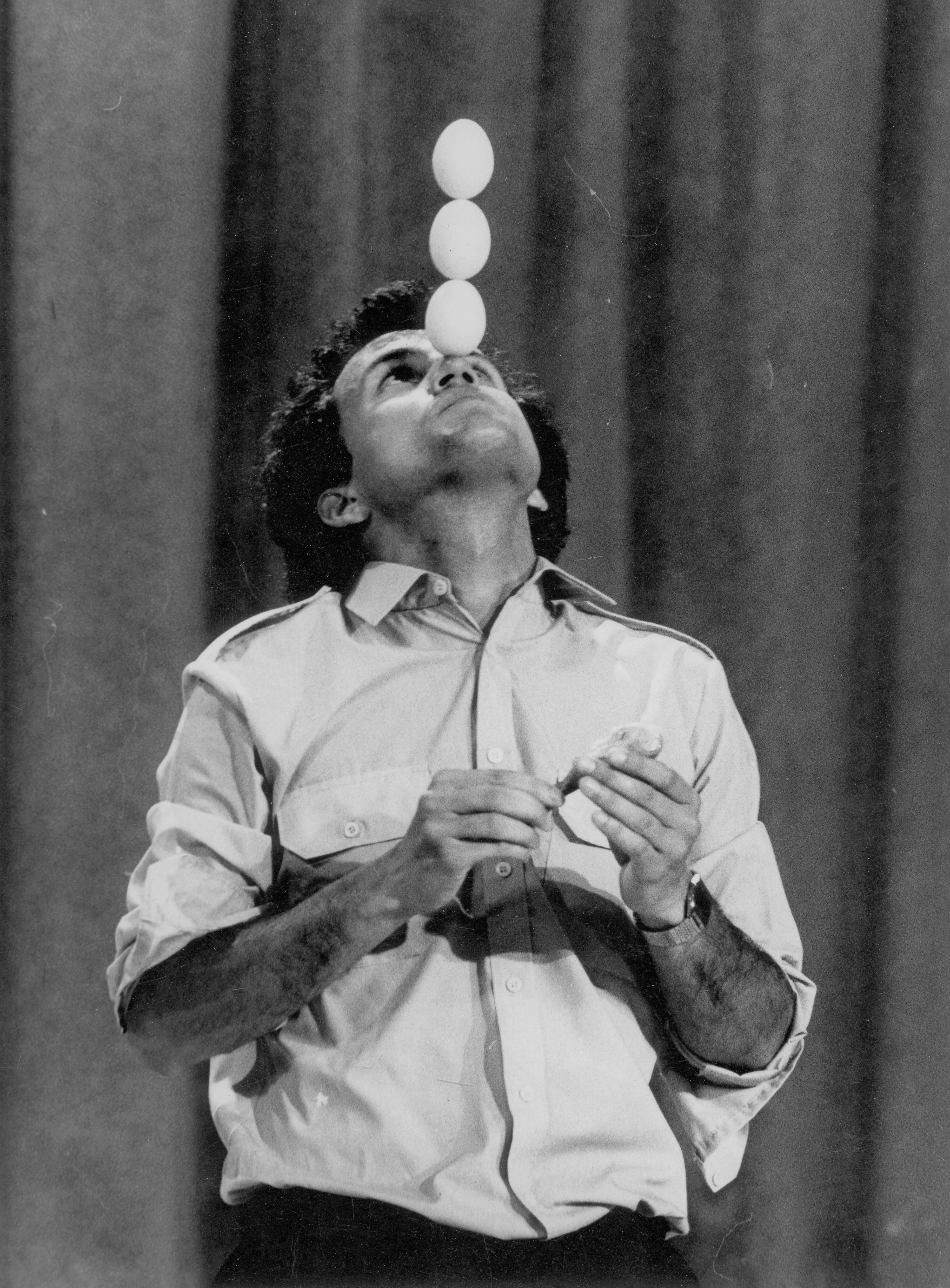 Ki mit tud? Forrás Csaba egyensúlyozó. Location: Hungary Tags: Hungarian TV, egg, wrist watch, talent show Title: Ki mit tud? Forrás Csaba egyensúlyozó.